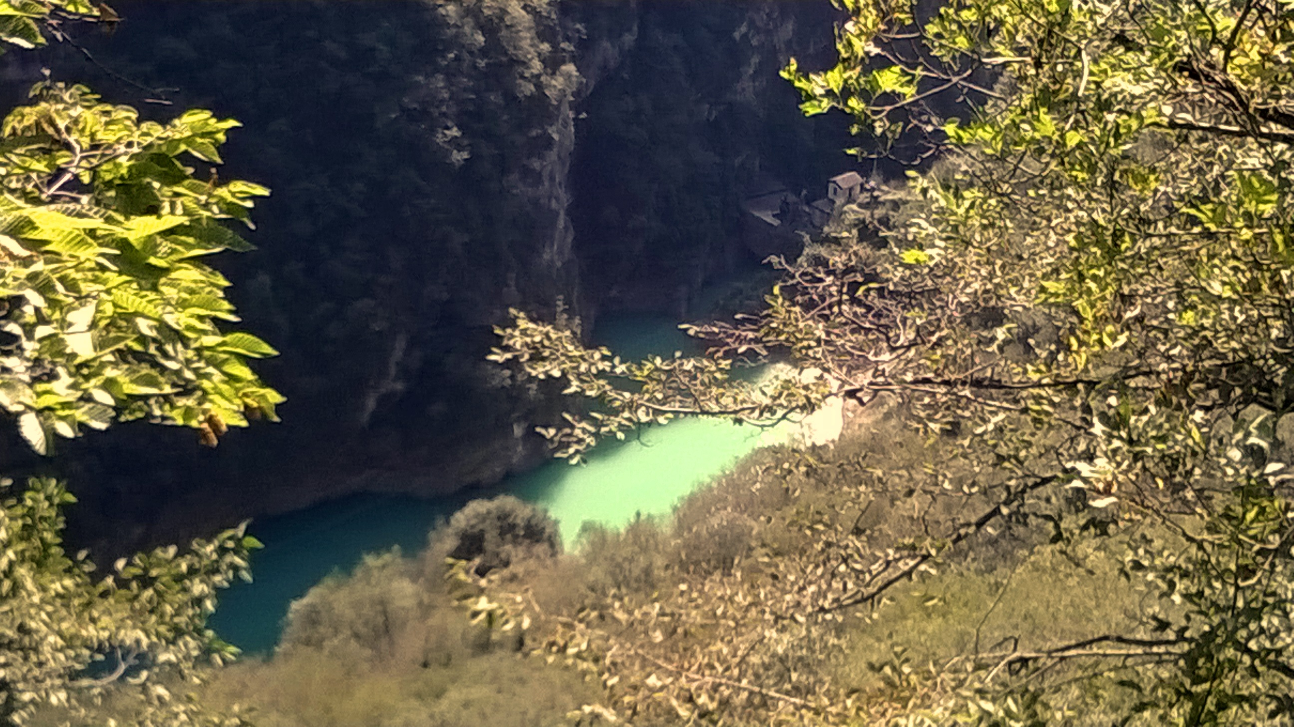 Laghetti Azzurri di Valzurio. Oltressenda alta (BG). Italy